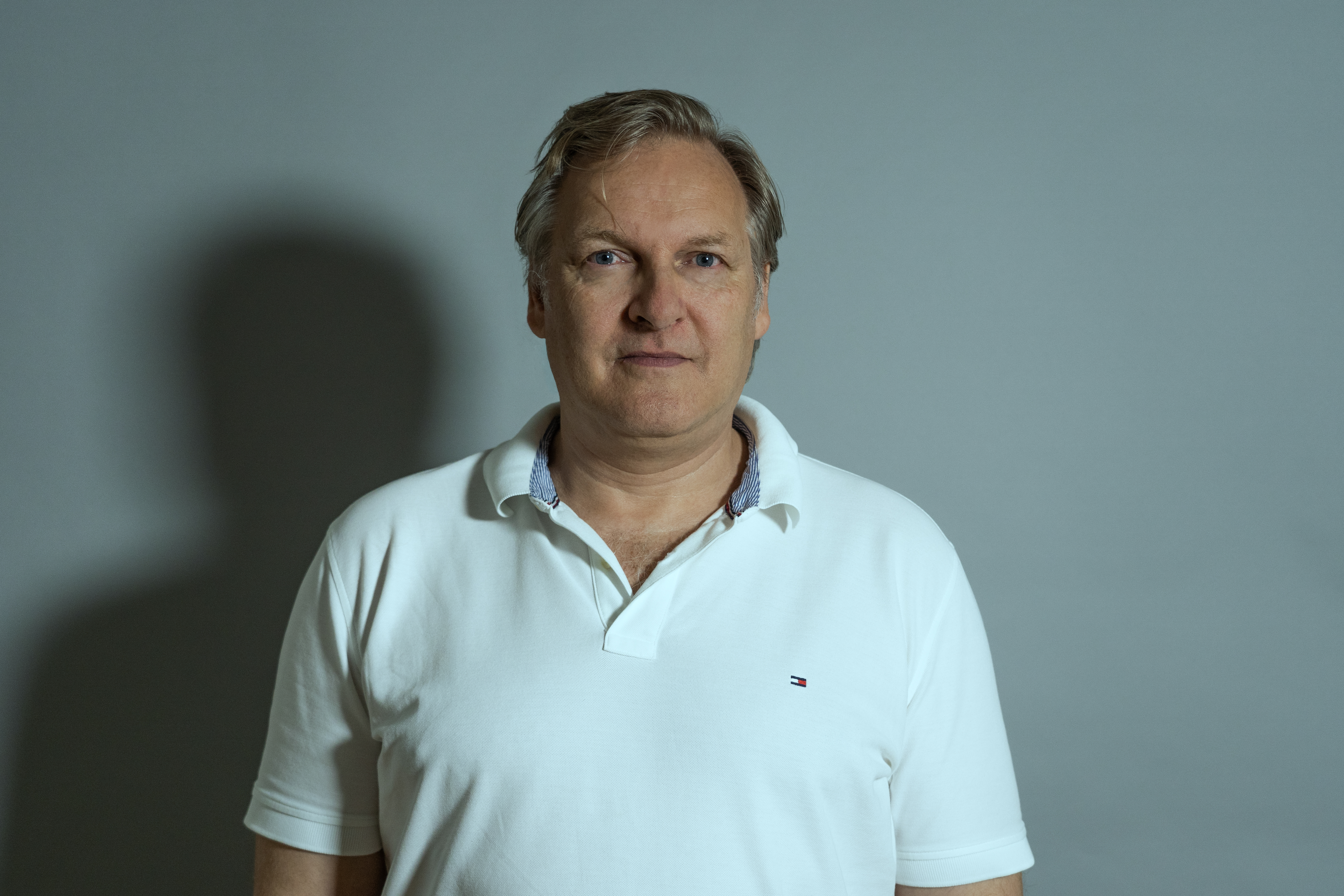 Peter Schels, Filmemacher aus München